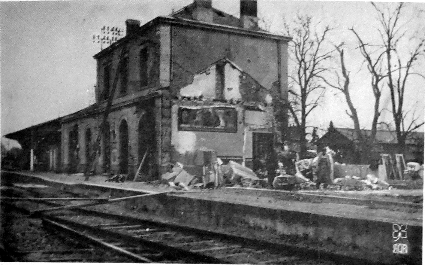 sur une vue ancienne.